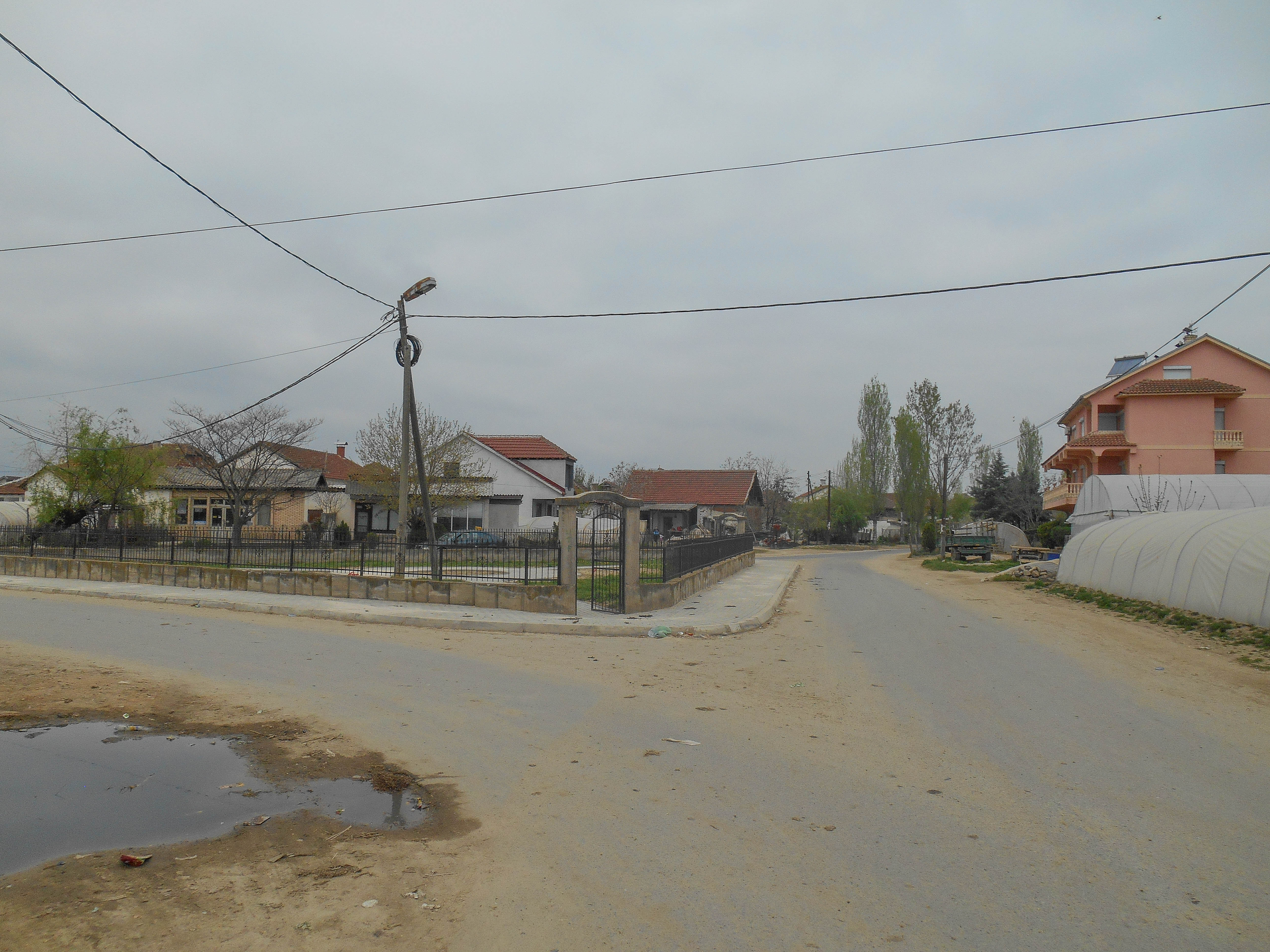 Просениково